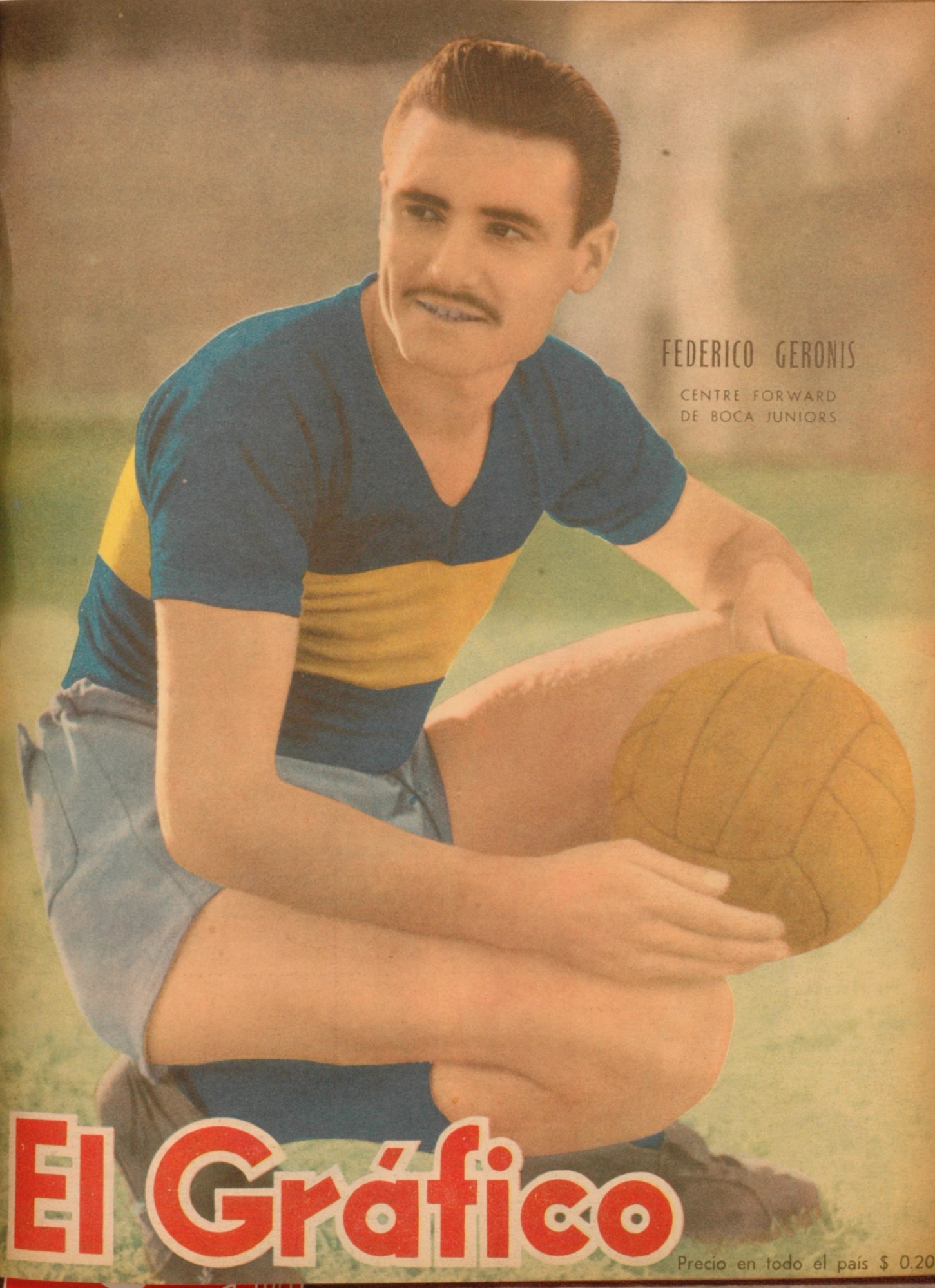 El Grafico del 06 de Junio de 1947. Edicion 1456